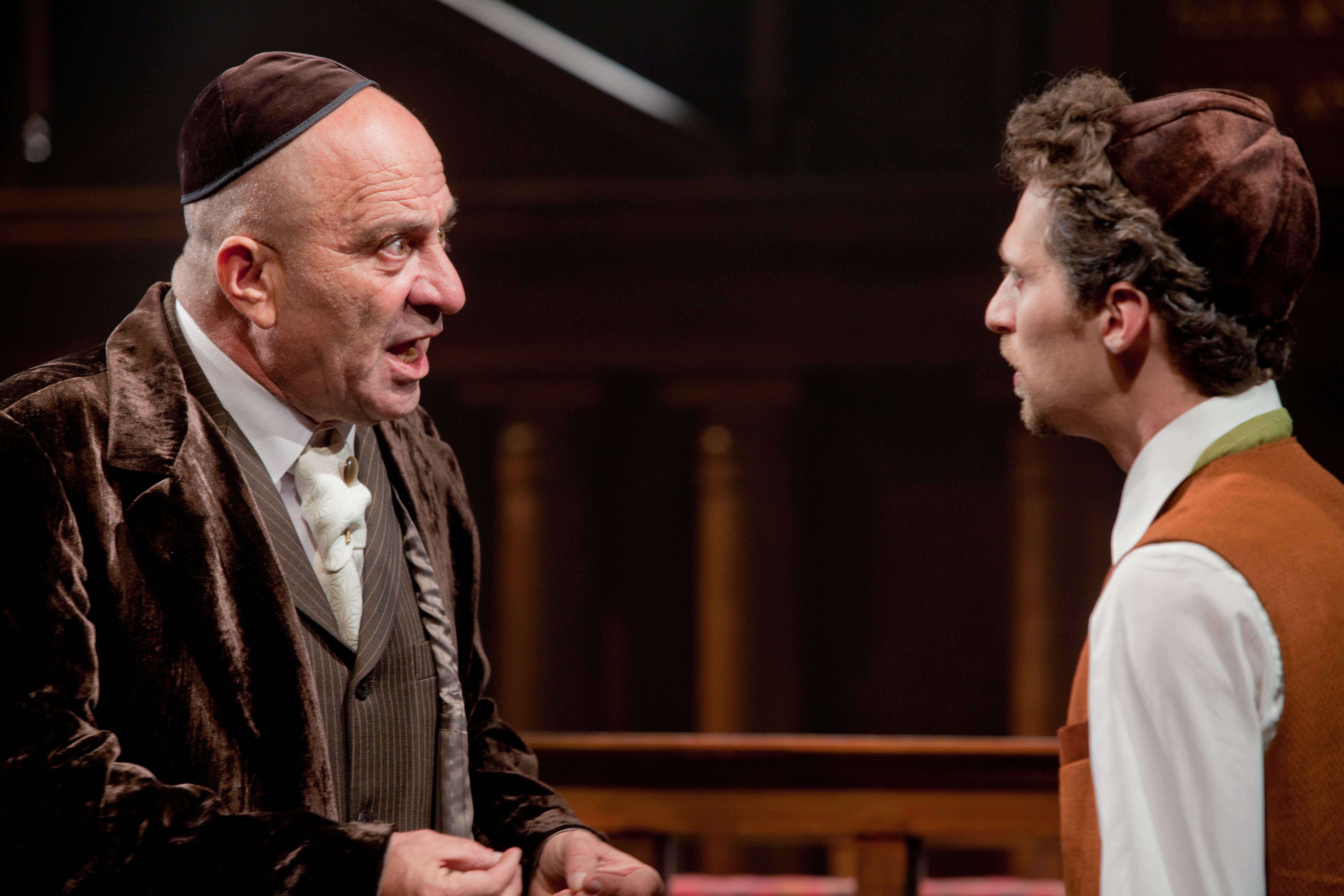 ויטלי פרידלנד ואריה צ'רנר, במחזה "ירושלים החדשה", בבימויו של סיני פתר, תיאטרון החאן, 2012